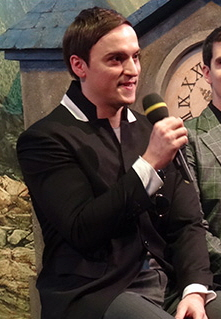 온게임넷 하스스톤 인비테이셔널 제작발표회